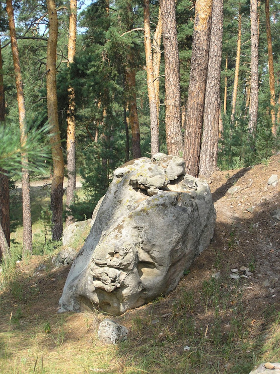 Валуны песчаника на территории памятника природы "Малоусинские нагорные сосняки и дубравы".